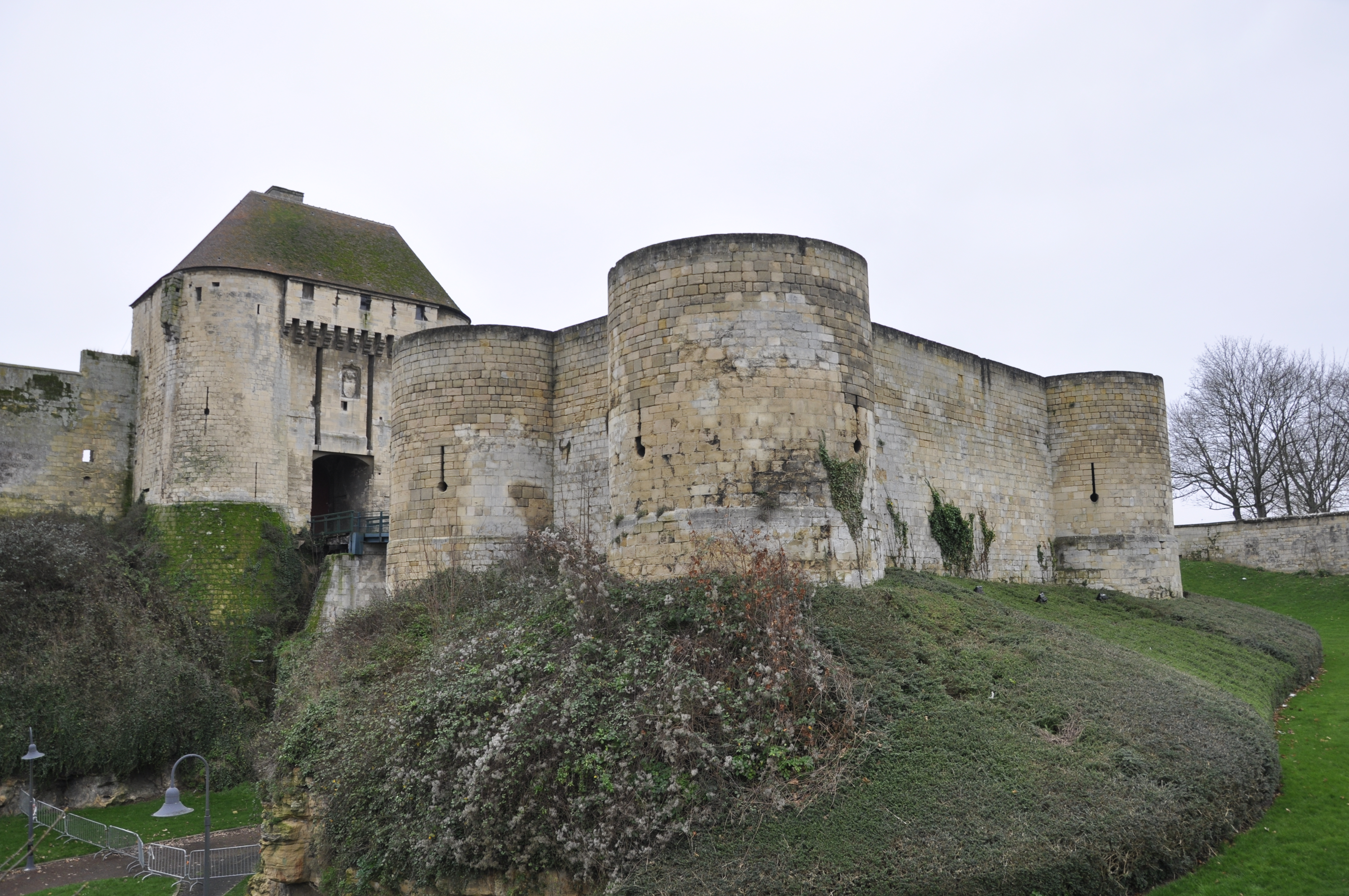 barbacane de la porte des champs du château de Caen